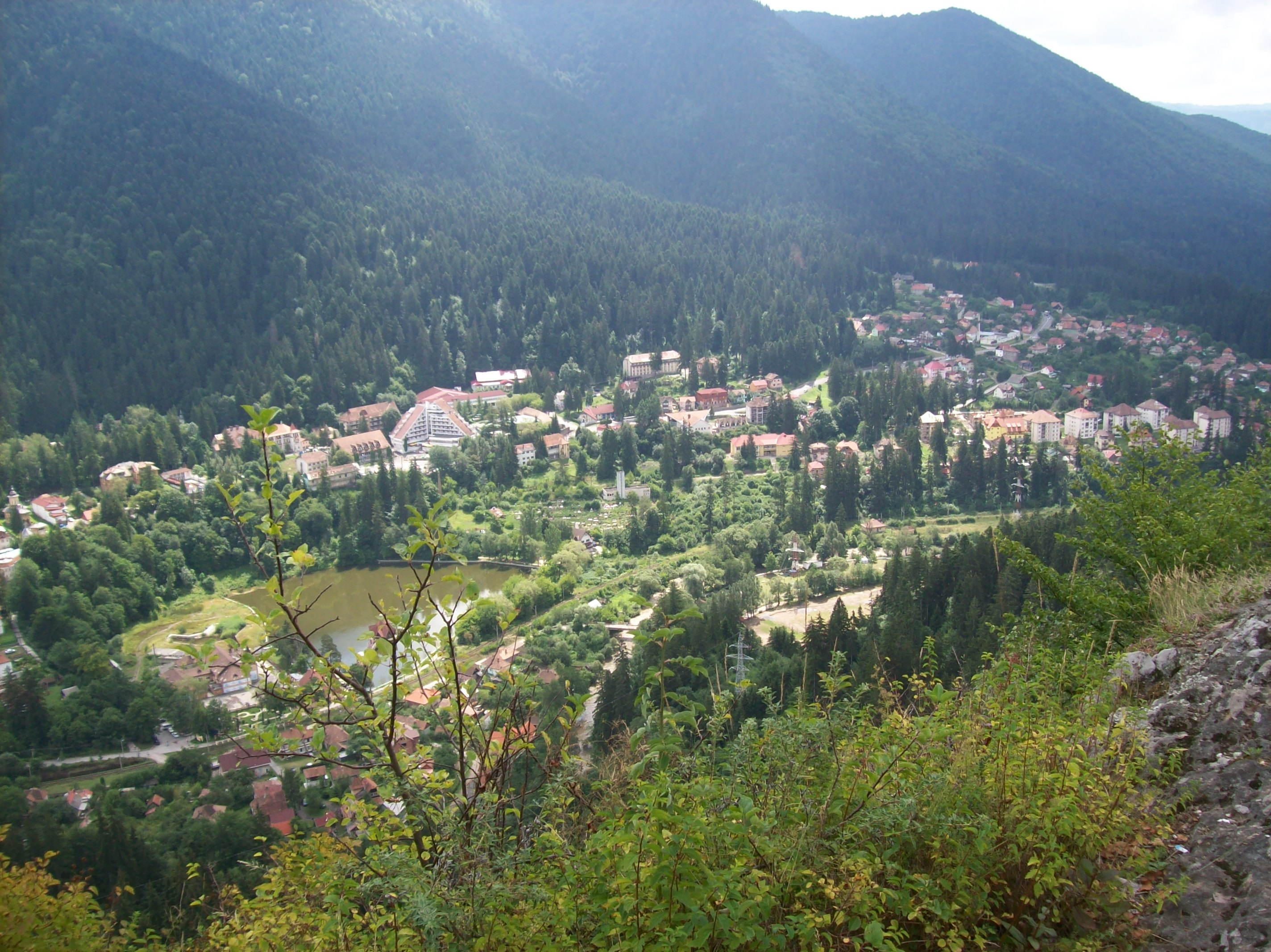 Băile Tușnad. Vedere de pe Stânca Șoimilor